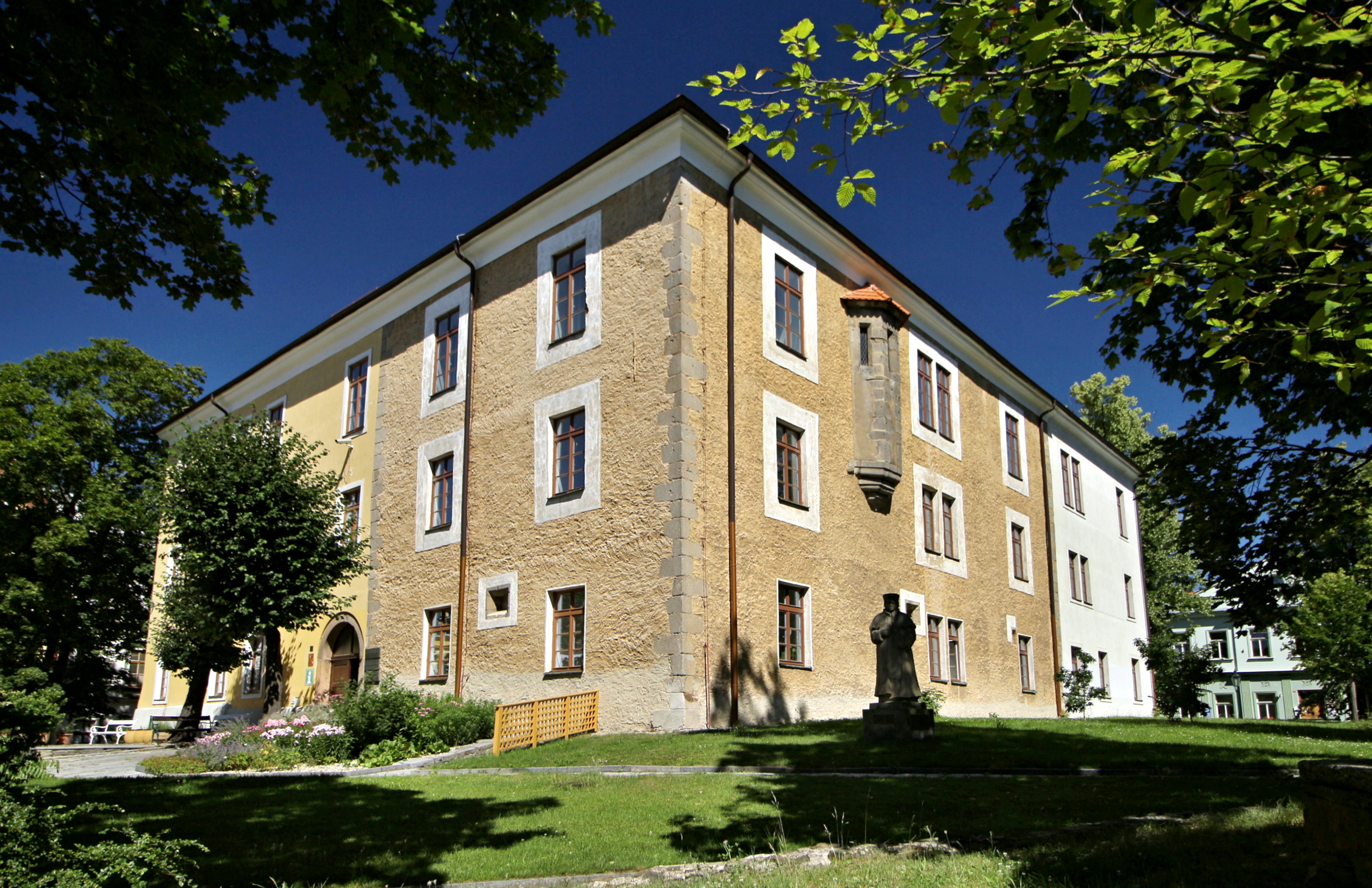 Arcibiskupský zámeček Ernestinum v Příbrami